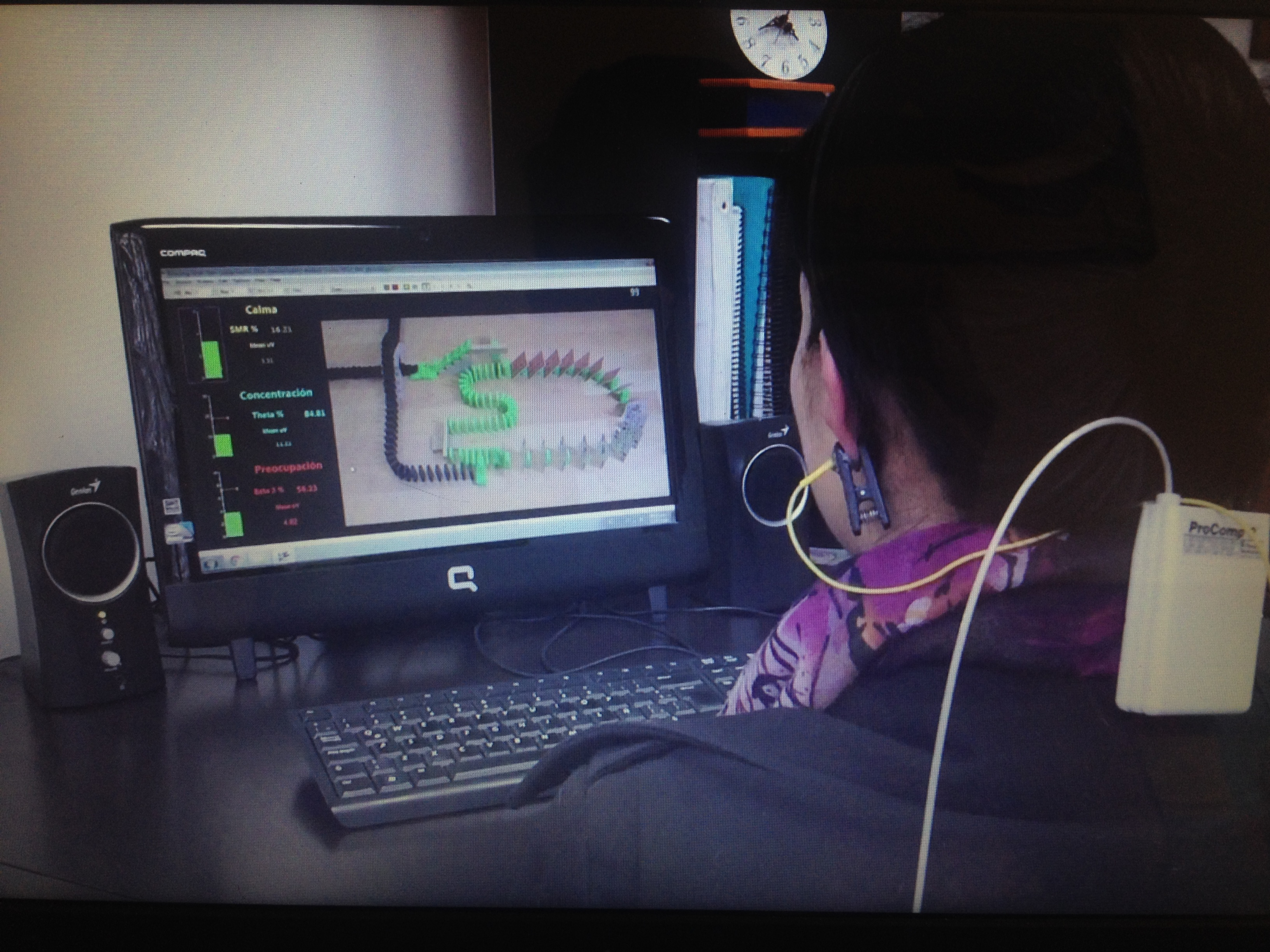 Terapia Neurfeedback o Neuroretralimentacion